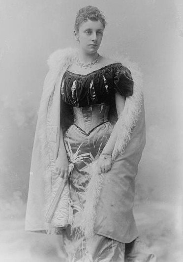 Feodora Adelheid, Princess of Schleswig-Holstein-Sonderburg-Augustenburg (1874 - 1910)